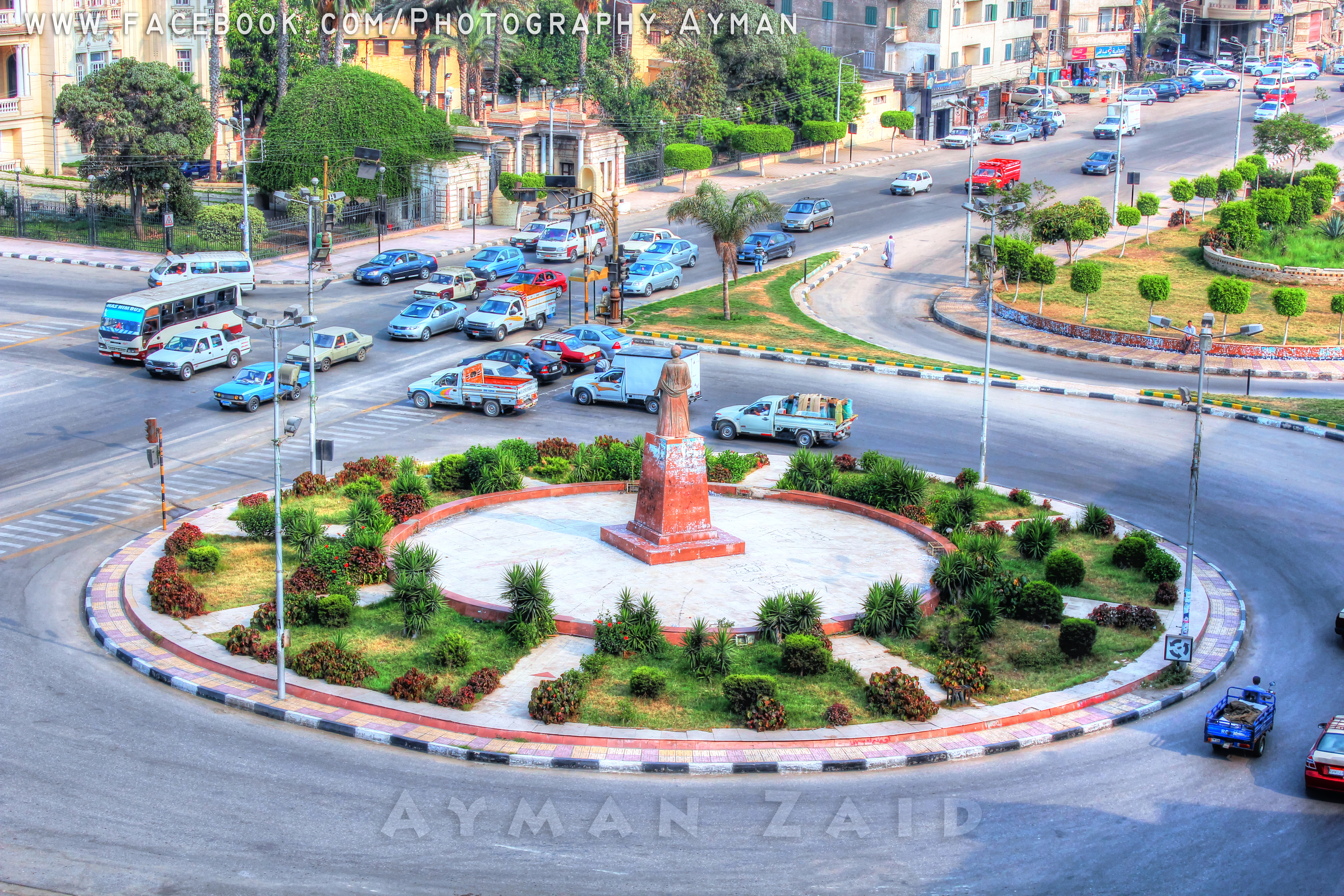 ميدان أم كلثوم - مدينة المنصورة